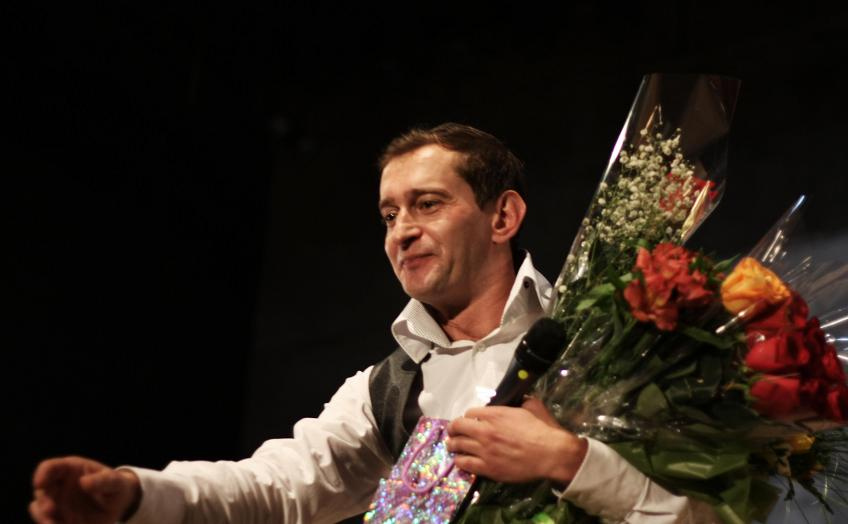 константин хабенский на своем творческом вечере